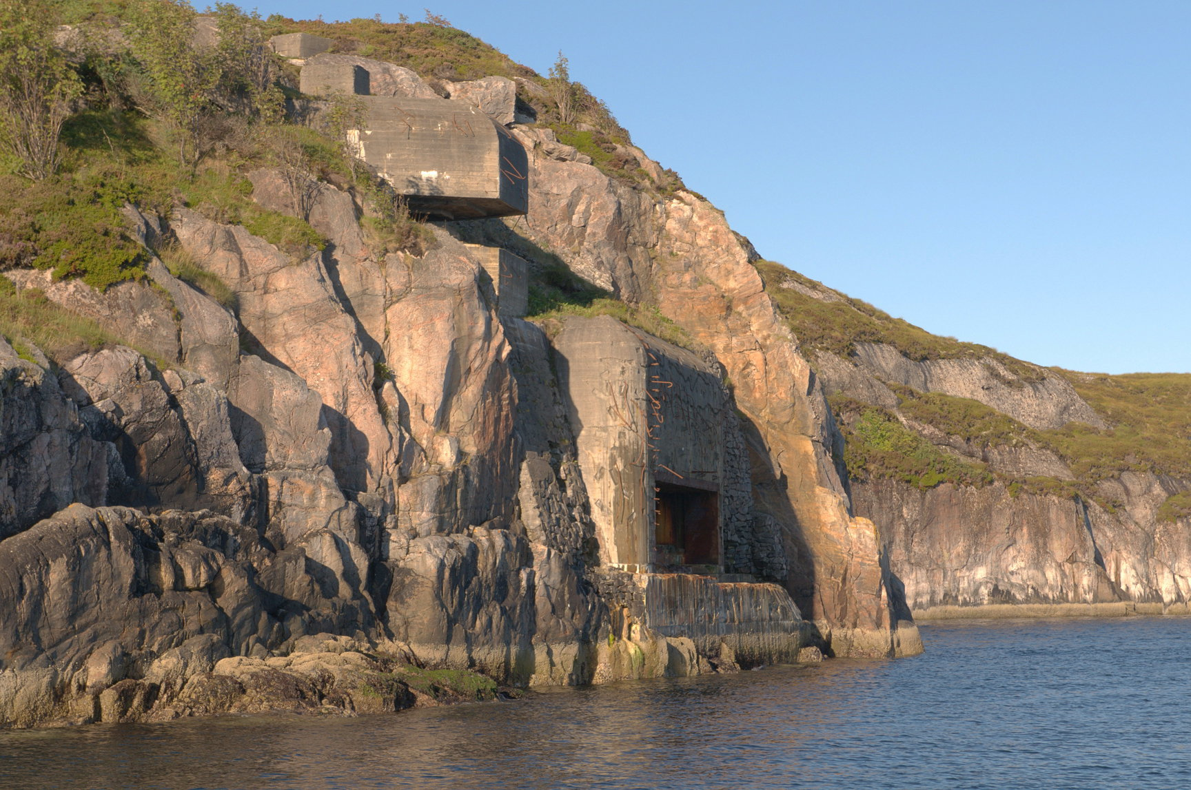 Torpedobatterie Nordlandet utenfor Kristiansund